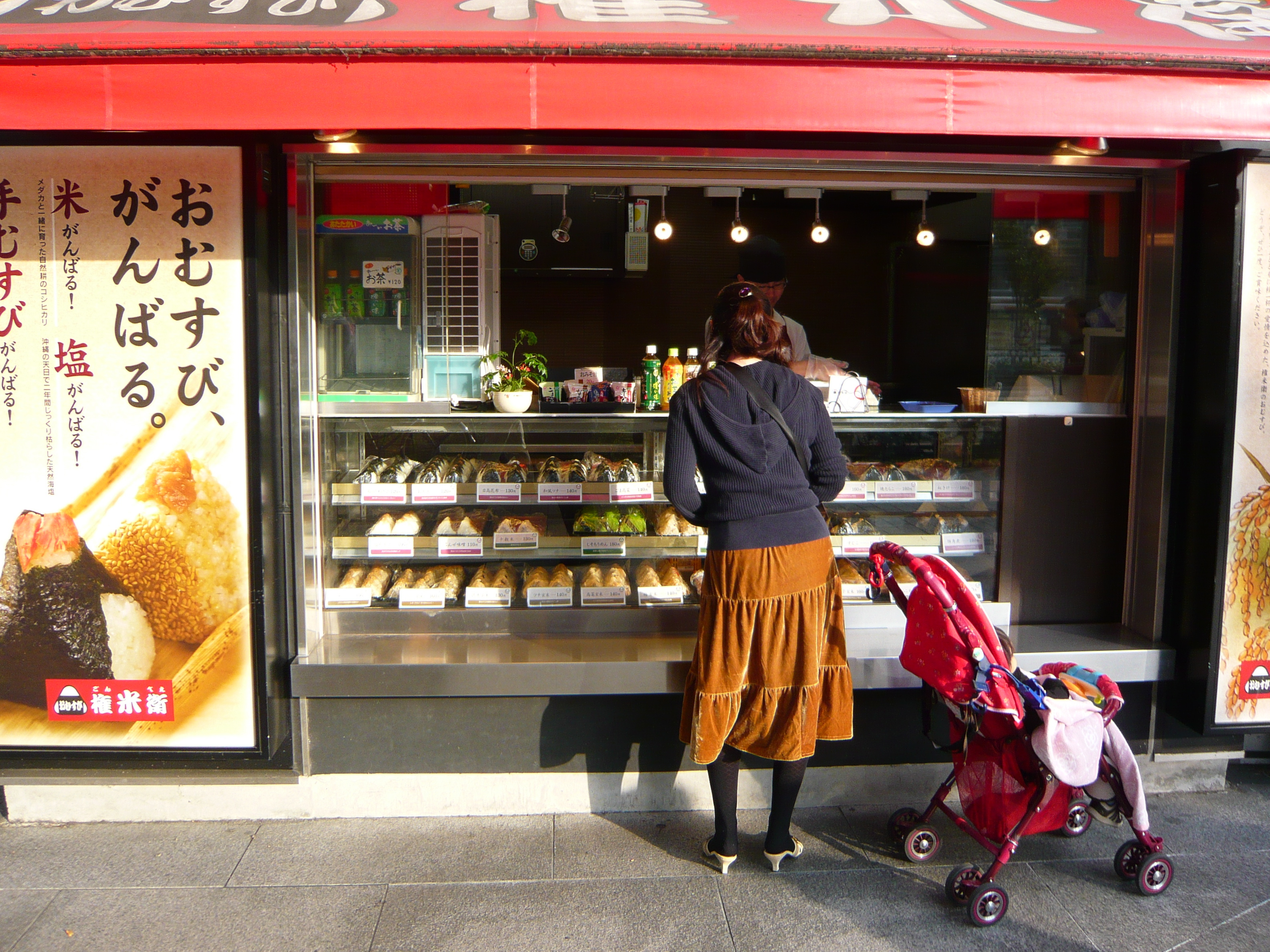 おにぎりショップ（東京・千代田区神田花岡町1-1、秋葉原駅最寄りのヨドバシカメラマルチメディアAkibaの「おむすび権米衛」[1]ヨドバシ秋葉原店）